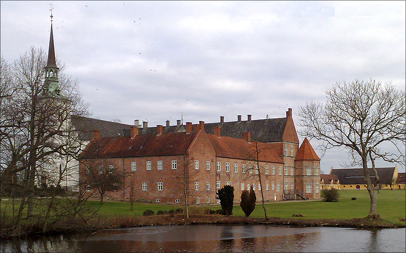 Brahetrolleborg Gods d. 30. januar 2009. Billedet er taget tæt ved Café Johan Ludvig.